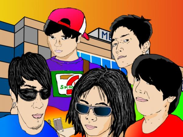 Tagalog: larawan ng bandang 7th skool na aking iginuhit